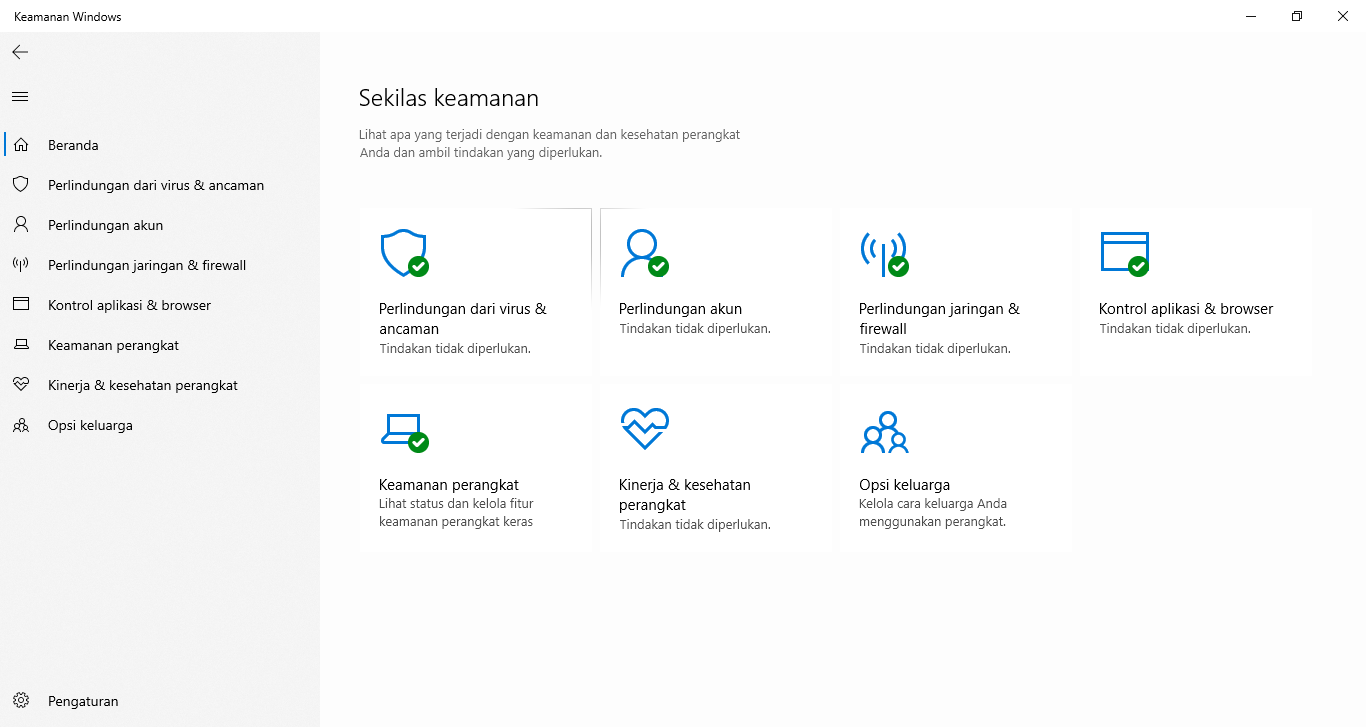 Windows Defender pada Windows 10